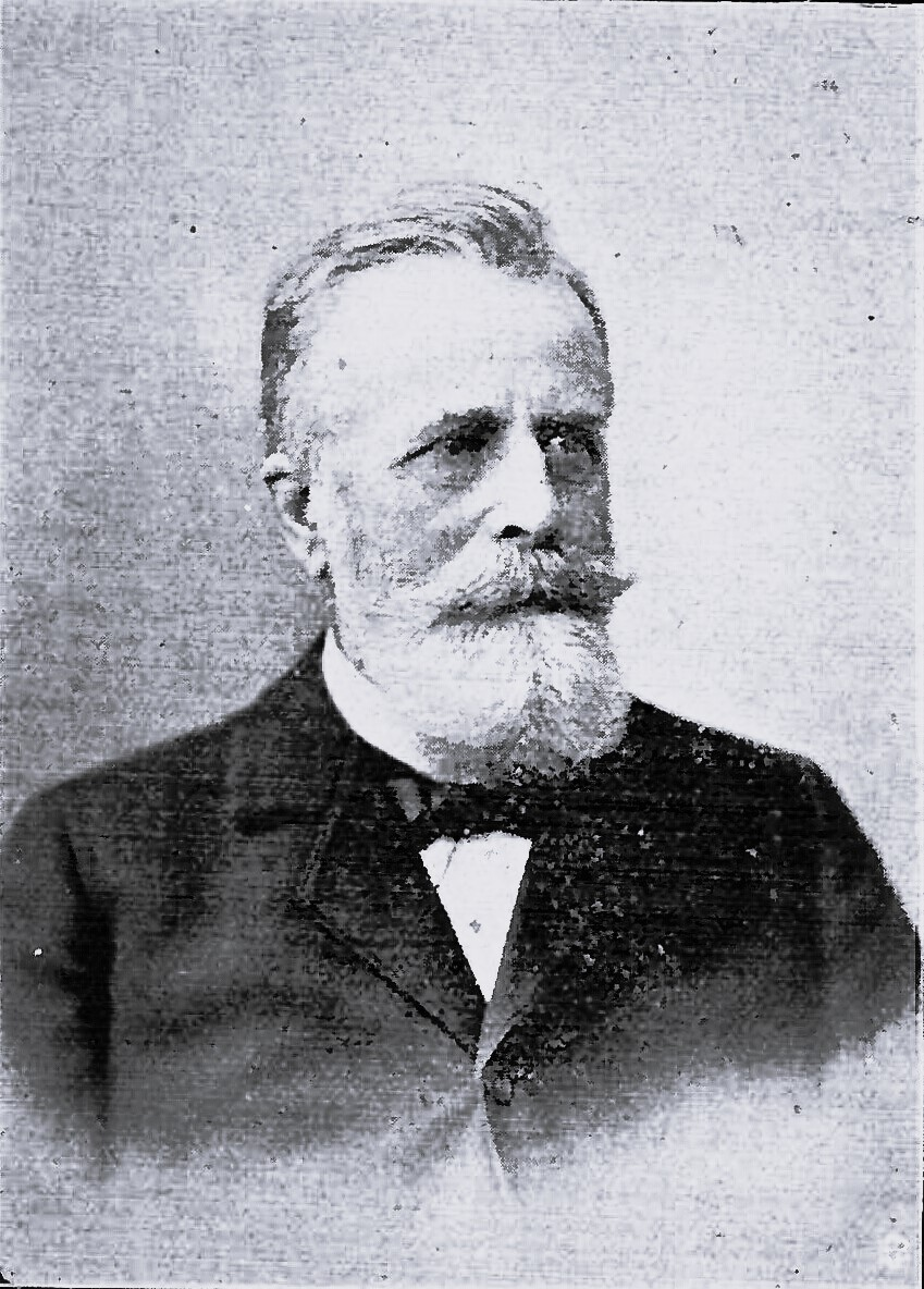 Geheimrat Wather Brecht, Vorsitzender der Direktion der Lübeck-Büchener Eisenbahgesellschaft.